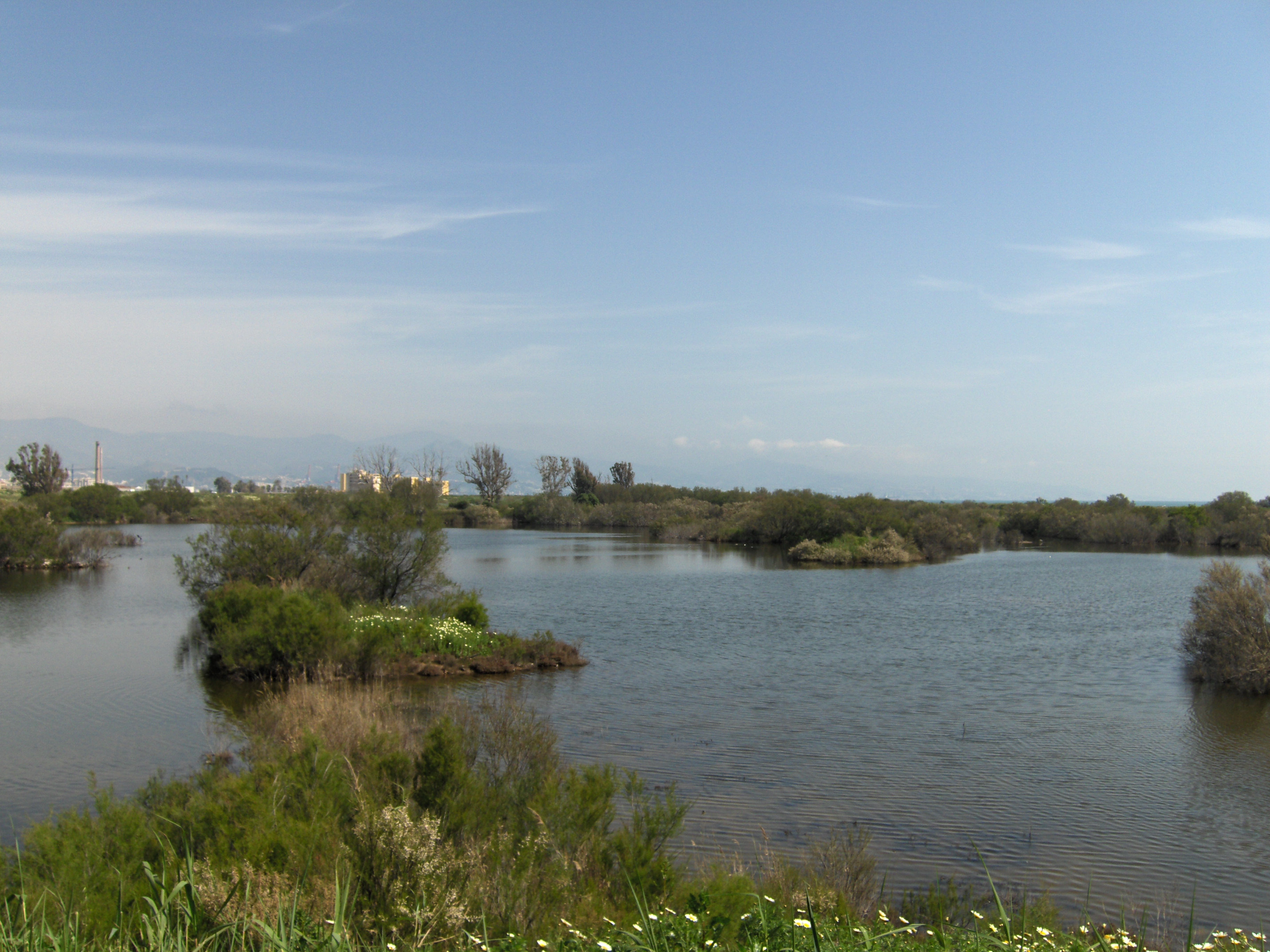 Paraje Natural Desembocadura del Guadalhorce, Málaga, España